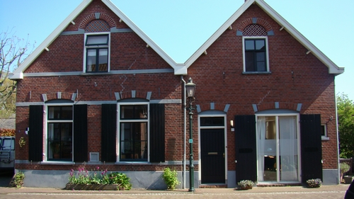 Gemeentemonument in Bredevoort